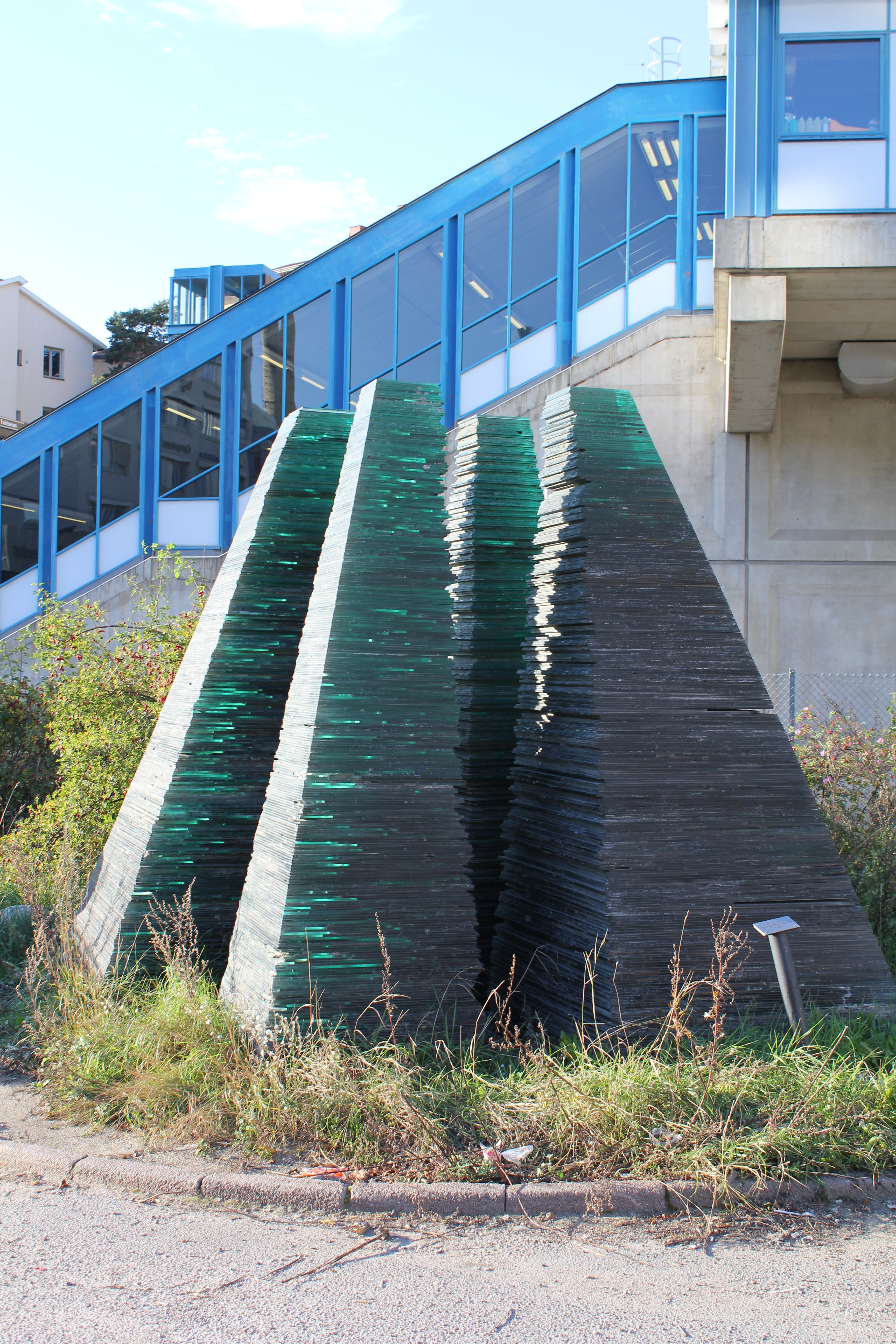 Isfantasi av Joanna Troikowics vid Globens tunnelbanestation. Rest 1989.